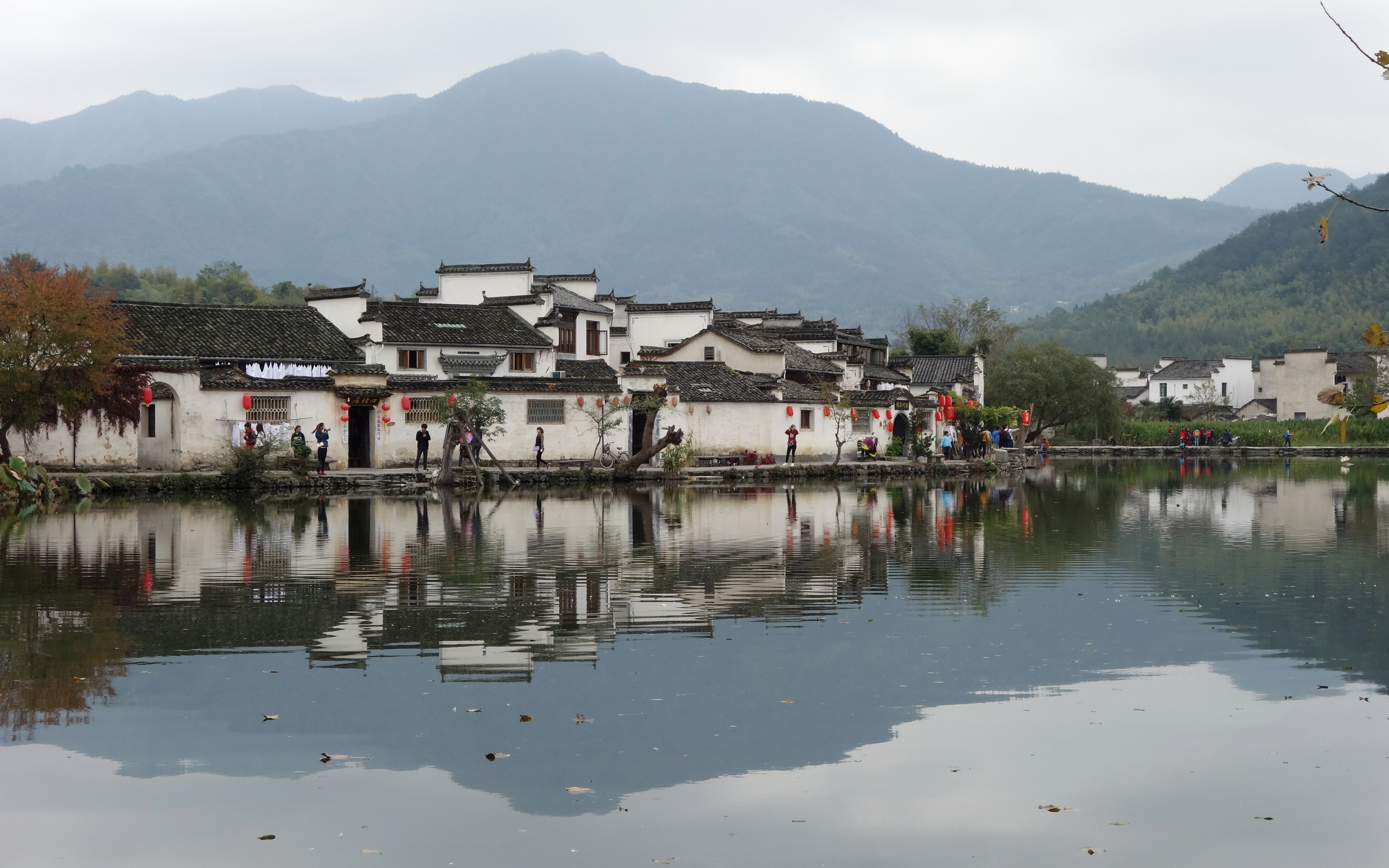 宏村古村落